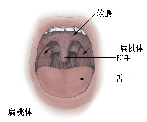 腭扁桃体图解，取自美国国家癌症研究所网站